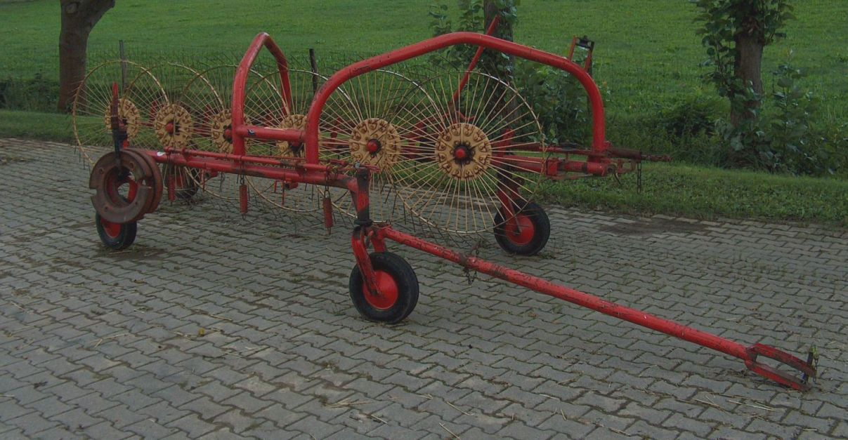 alter Heuschwader, Sternradschwader